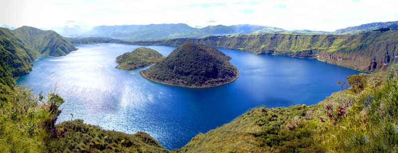 Laguna Cuicocha, Kratersee in Ecuador